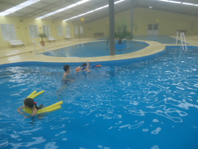 Piletas de agua termal.